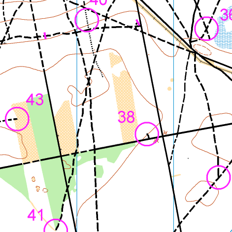 Väljavõte Kuusalu rattaorienteerumiskaardist